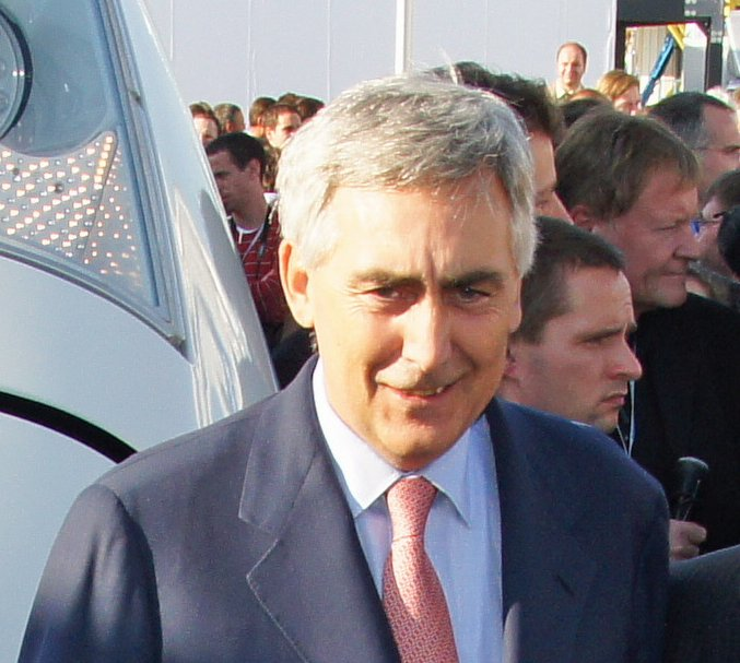 Siemensvorstand Peter Löscher